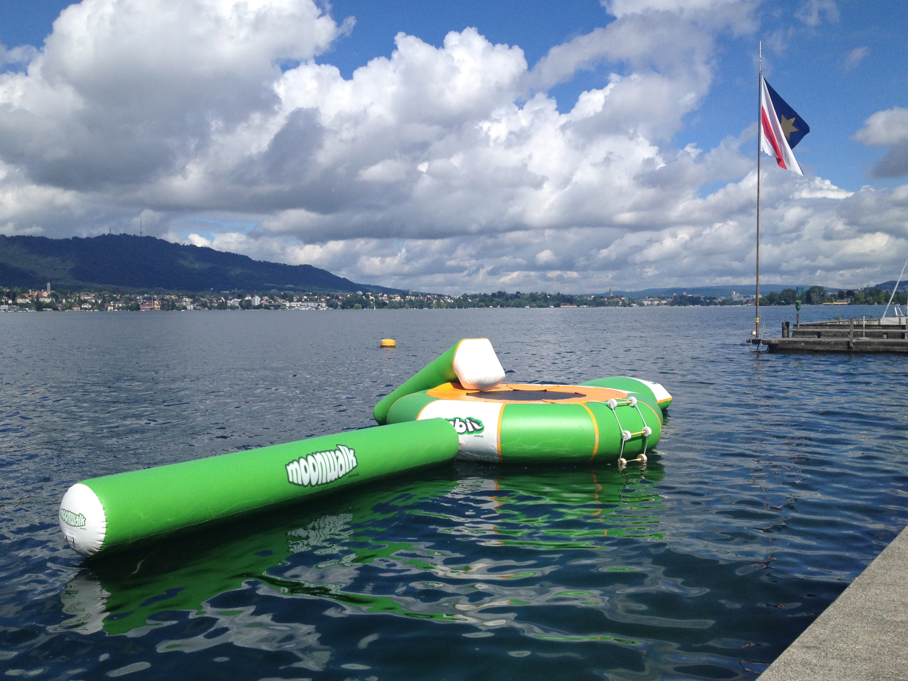 Trampolin in der Seebadi Zollikon auf dem Zürichsee